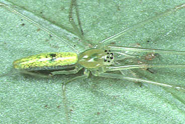 male Tetragnatha tanigawai from Okinawa.